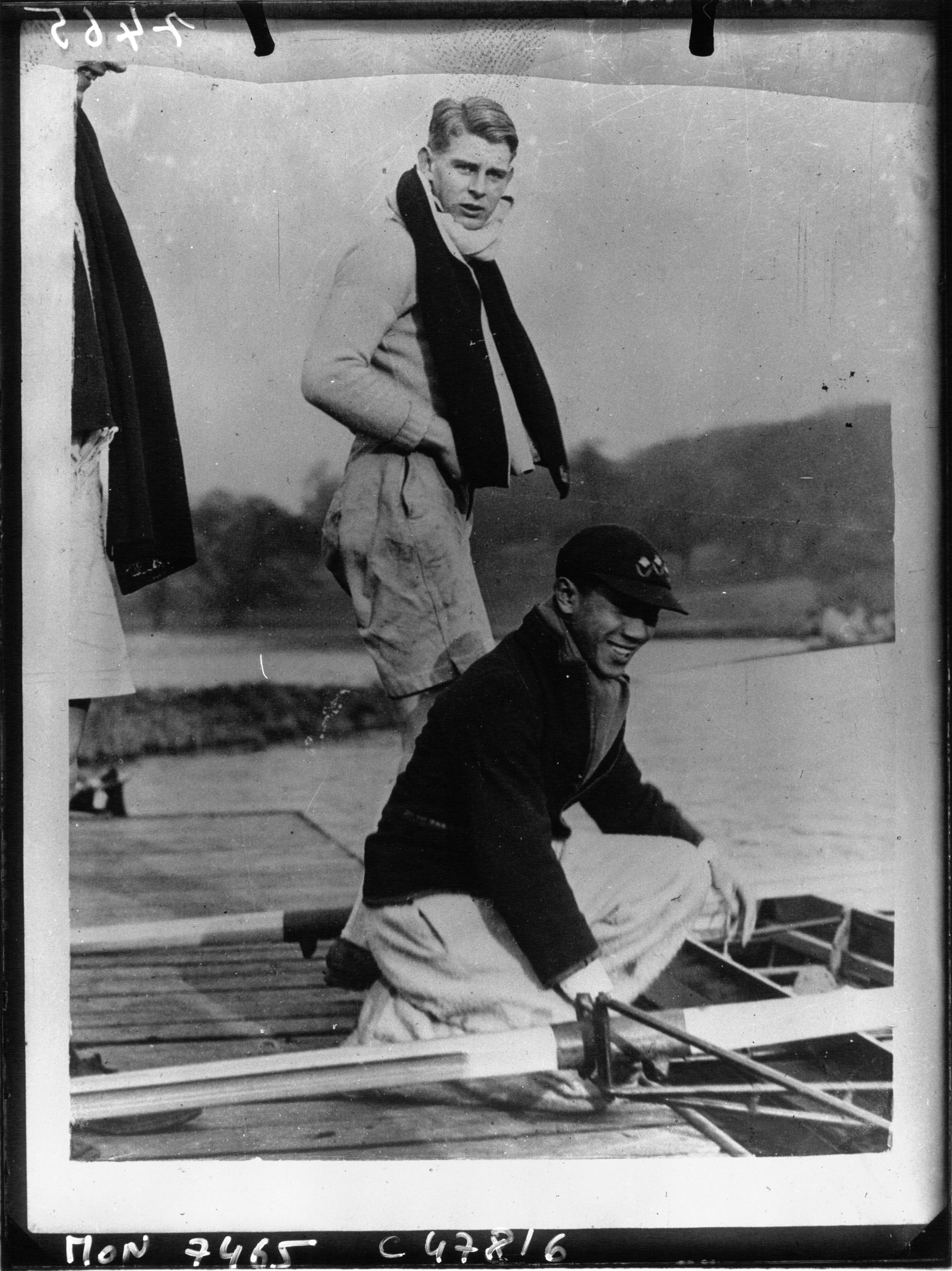 Le prince Komarakul - Nagara de Siam s'entraînant à l'aviron avec ses camarades de l'école d'Oxford en vue du Championnat annuel contre Cambridge : [photographie de presse] / Planet